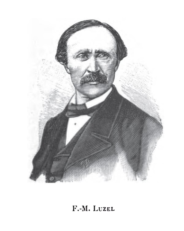 Portrait gravé de F. M. Luzel, en page 89 de Joseph Rousse, La poésie bretonne au XIXe siècle, Lethielleux Paris 1895. L'image est plus ancienne, vers 1870.